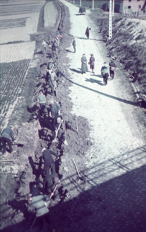 Kabel - Ostende